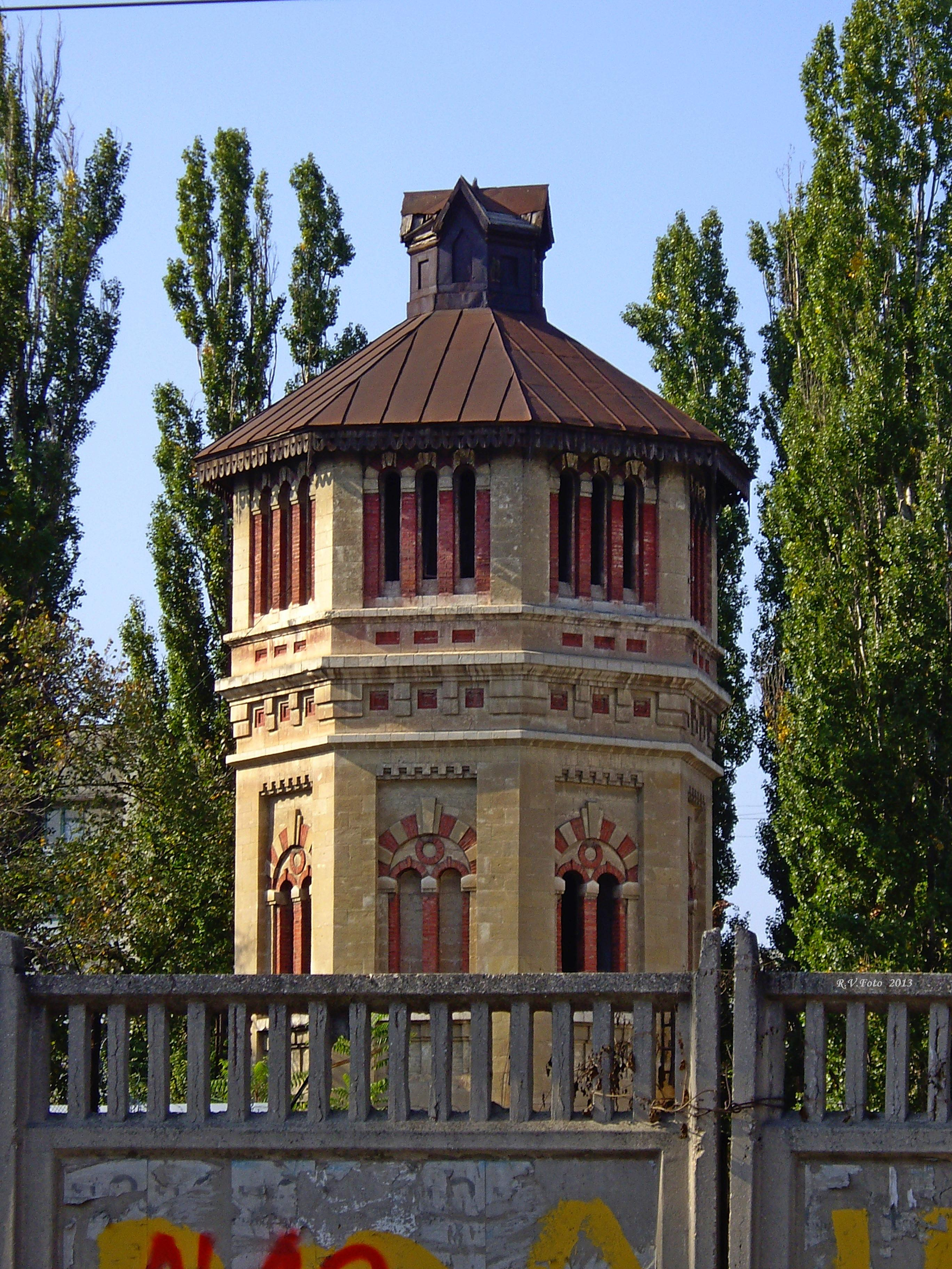 вул. А. Невського, 27 (Р. Люксембург); 1)